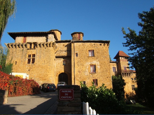 Château de Chessy-Les-Mines, dans le Beaujolais (France)